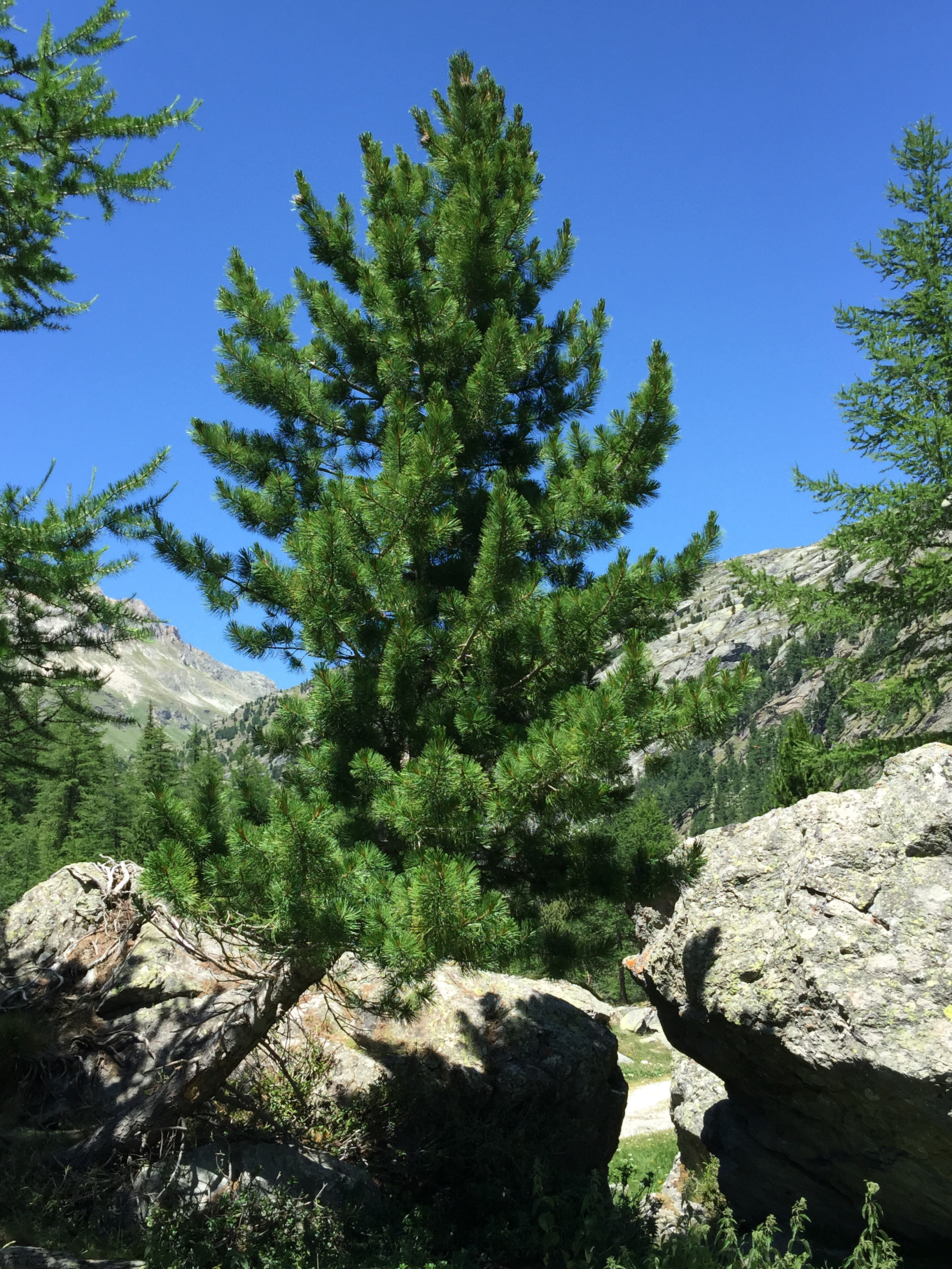 L'Arolle, ou Pin Cembro affectionne particulièrement les pentes des hauts massifs internes alpin